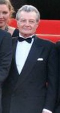 Philippe Laudenbach lors de la présentation du film Des hommes et des dieux au festival de Cannes